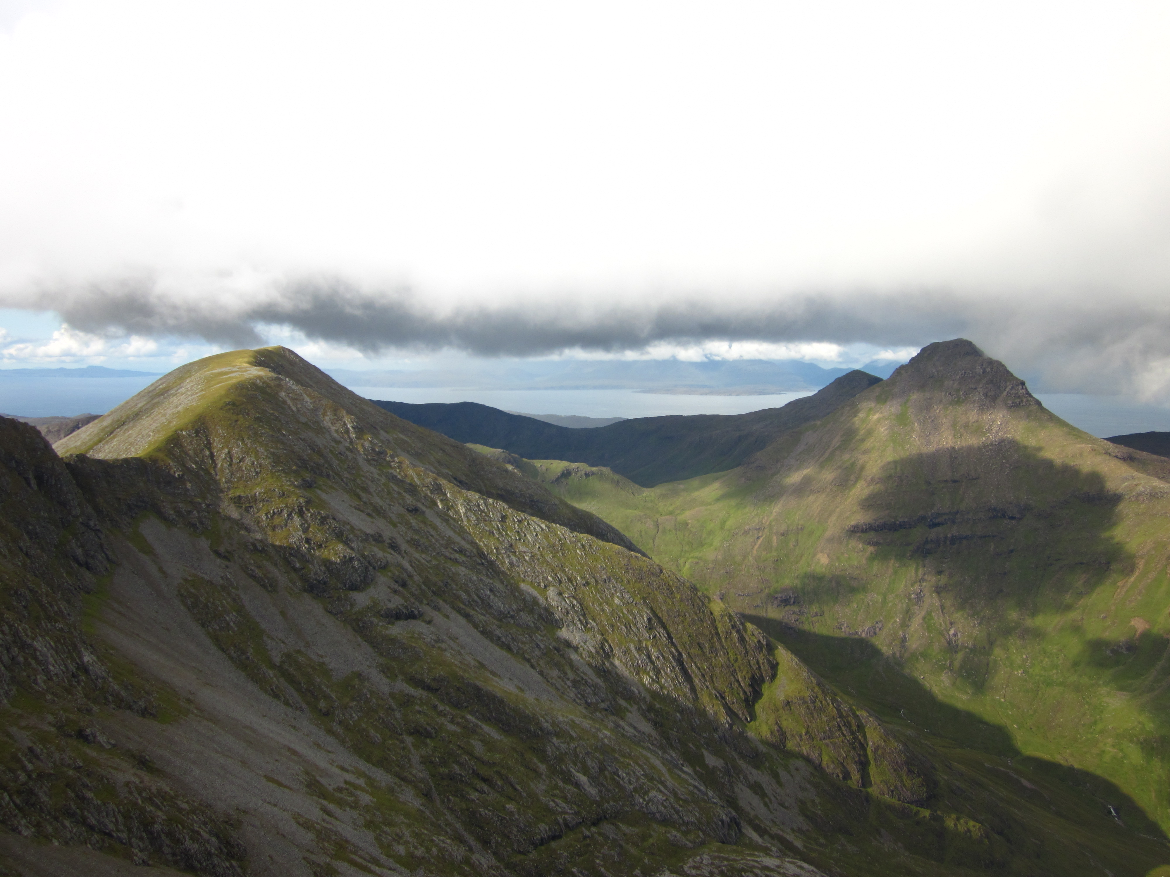 Ainshvall and Askival from Sgùrr nan Gillean.